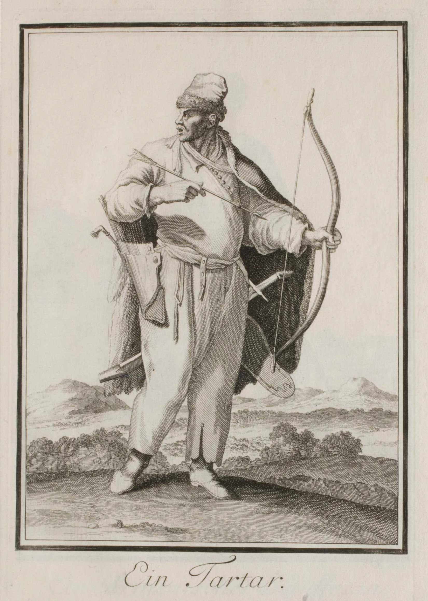 Neu-eröffnete Welt-Galleria. ..., Nürnberg 1703. 90. Ein Tartar.